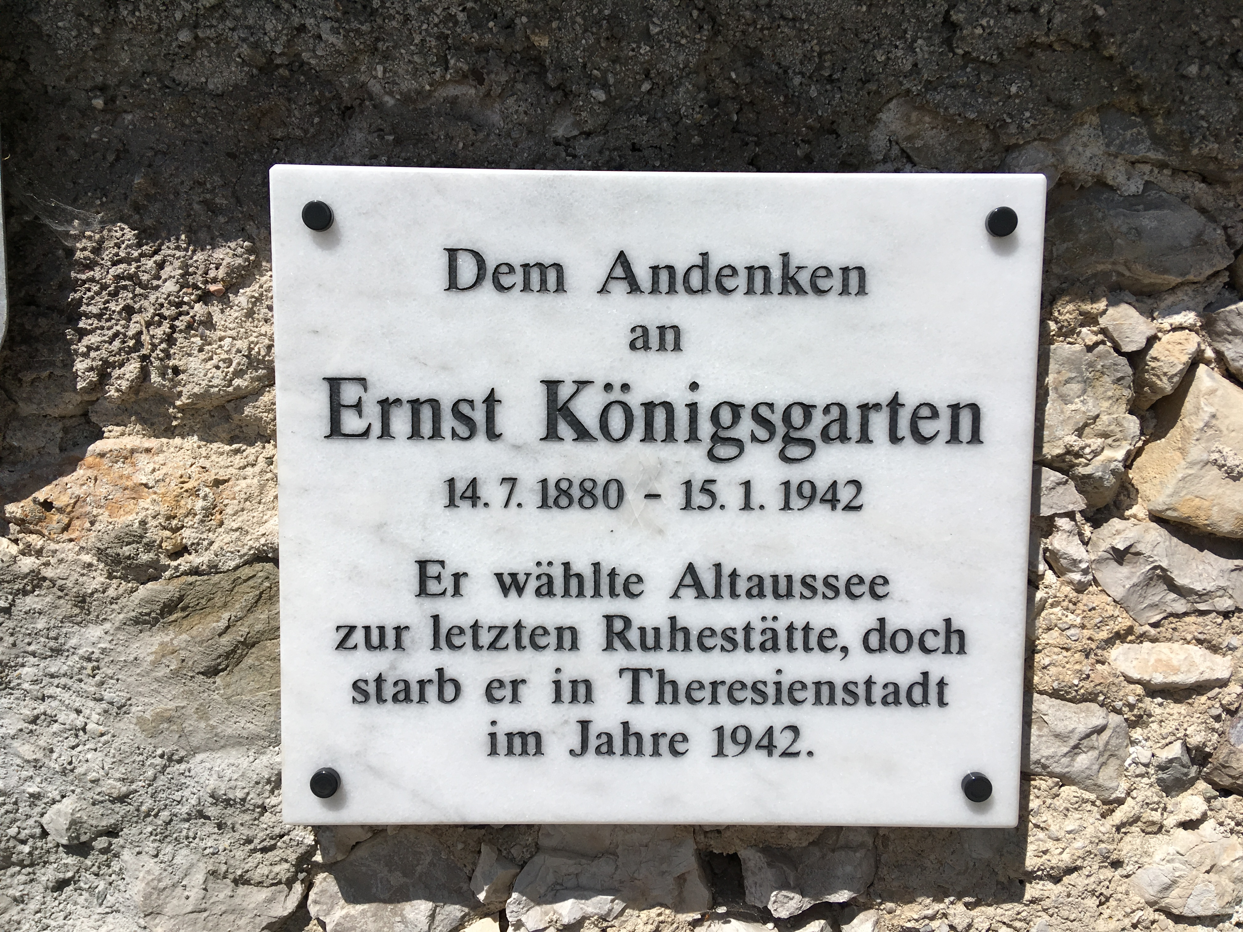 Gedenktafel für Ernst Königsgarten in Altaussee, Österreich